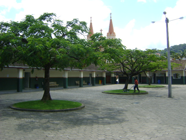 Pátio interno do Colégio Almirante Tamandaré